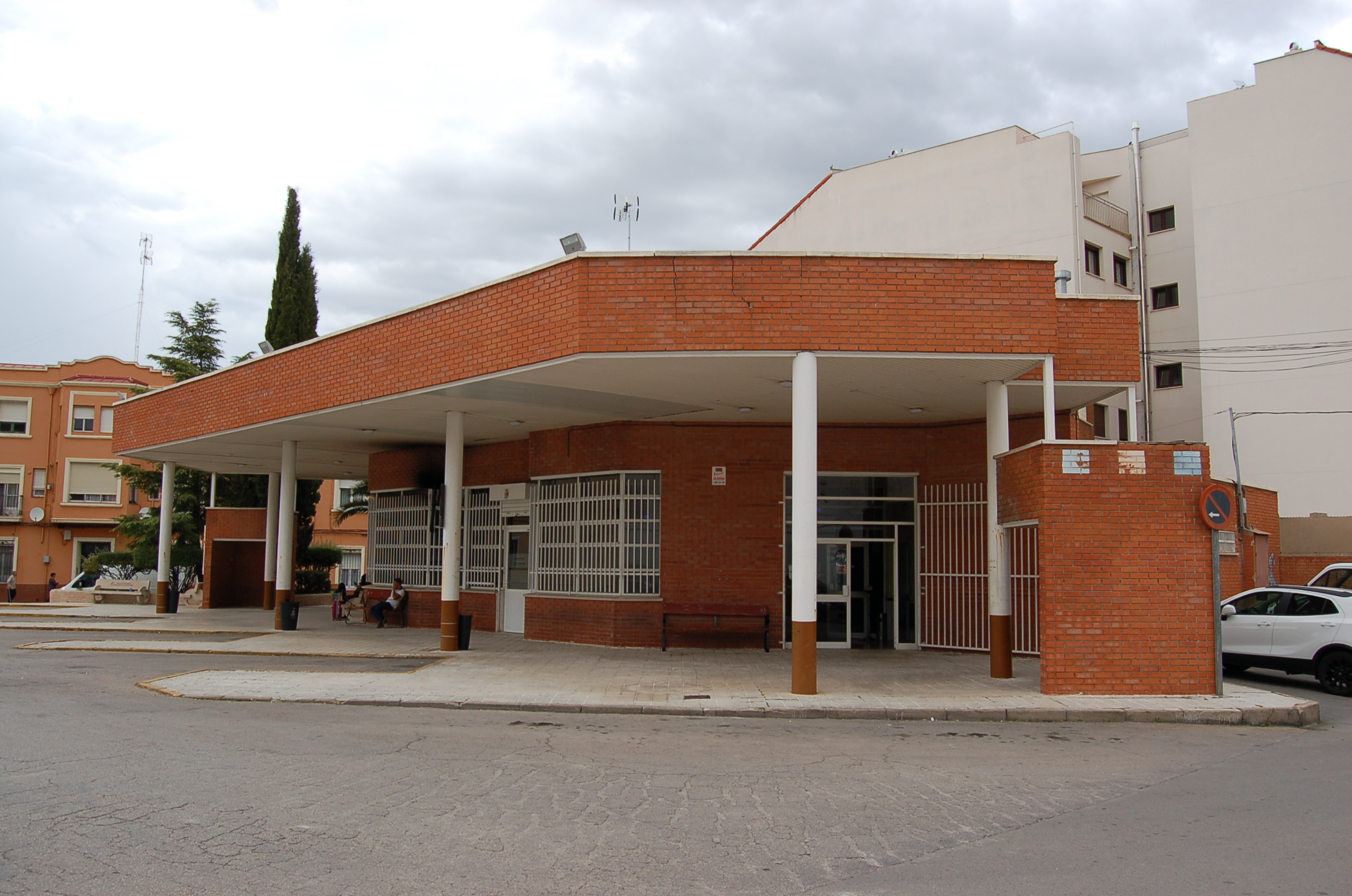 Estación de buses Tarancón